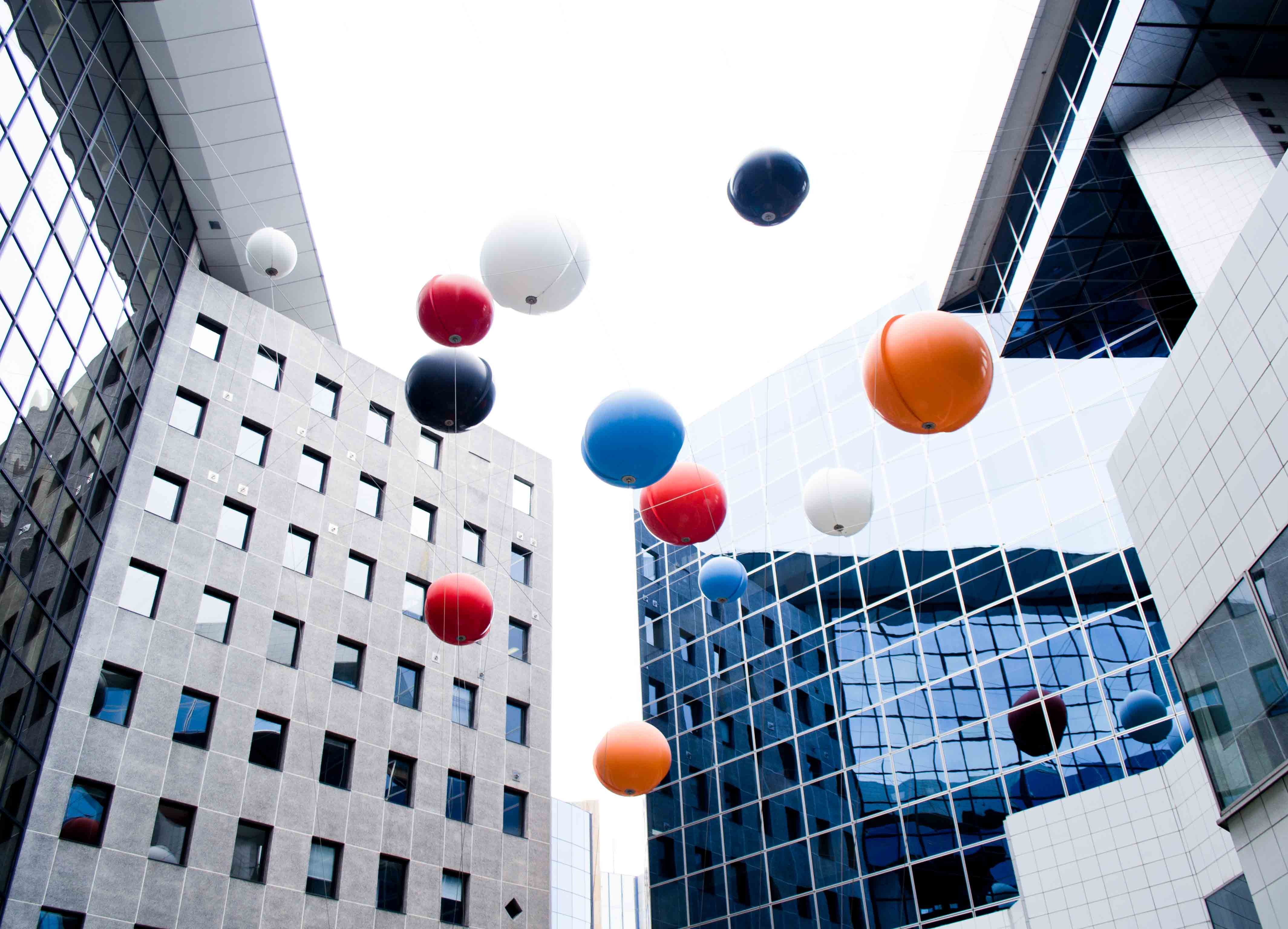 Quartier de l'Arénas à Nice.